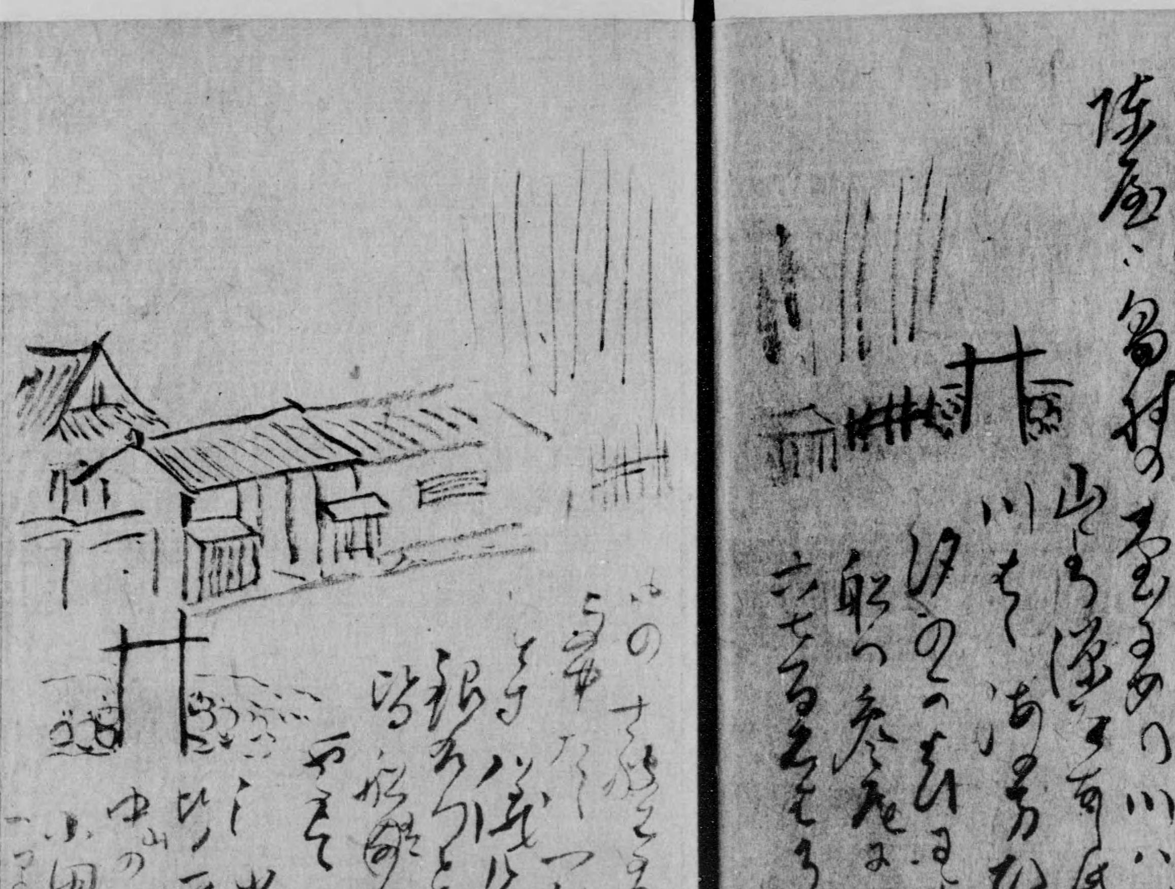 渡辺崋山が天保4年（1833）に渥美郡畠村を訪れた際に描いた畠村陣屋のスケッチ。『参海雑志』所載。